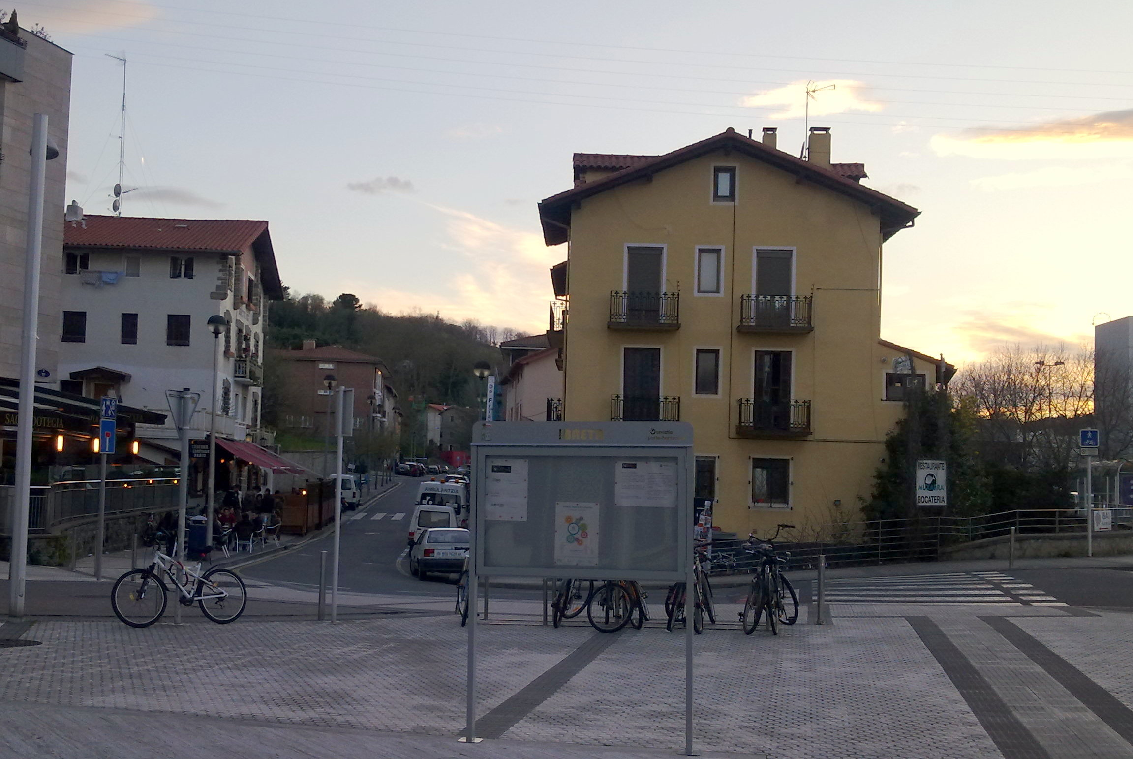 Donostiako Ibaeta auzoa